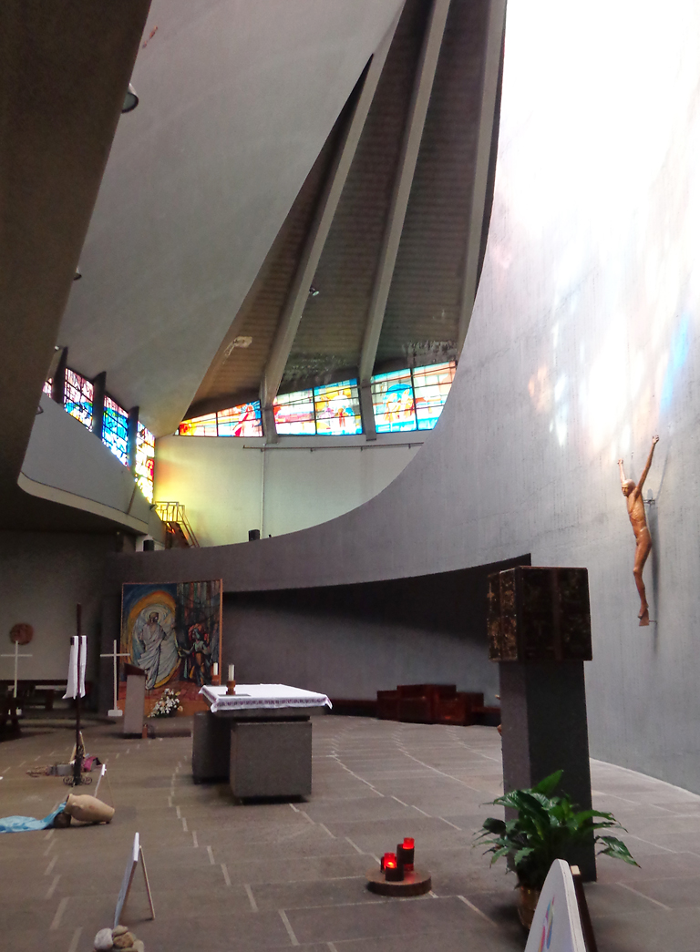 Milano, chiesa della Resurrezione di Nostro Signore Gesù Cristo. L'altare.